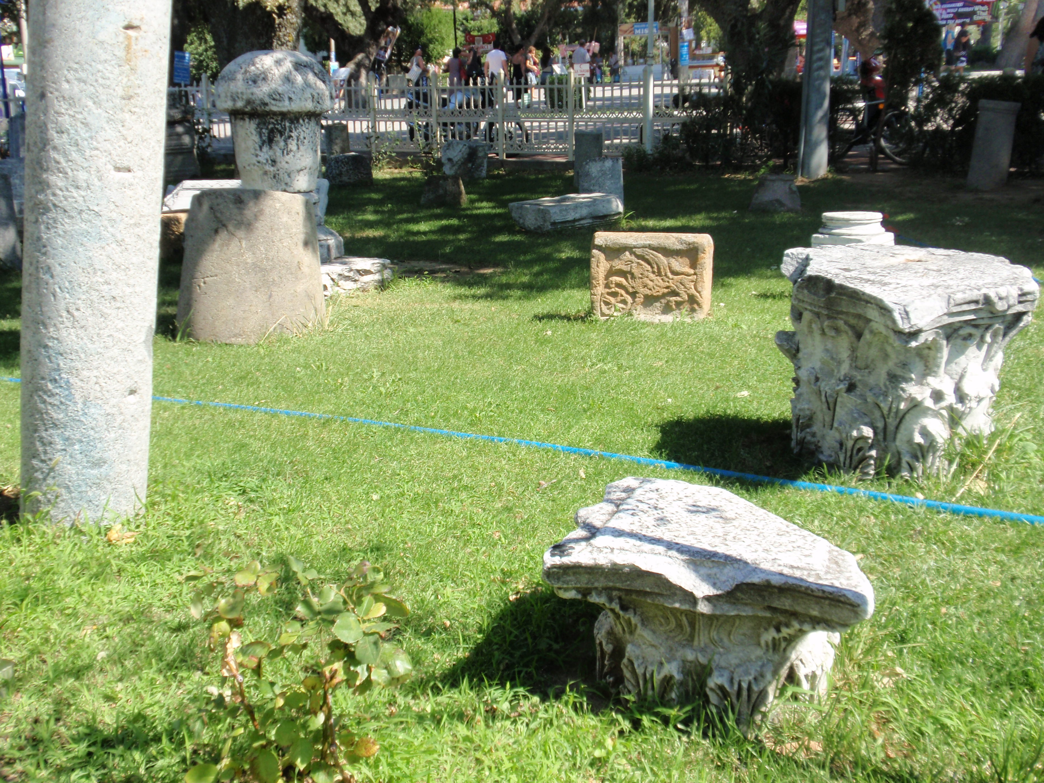 Ören merkeze sergilenen tarihi eserler